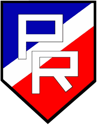 Escudo del Partido Radical de Chile.